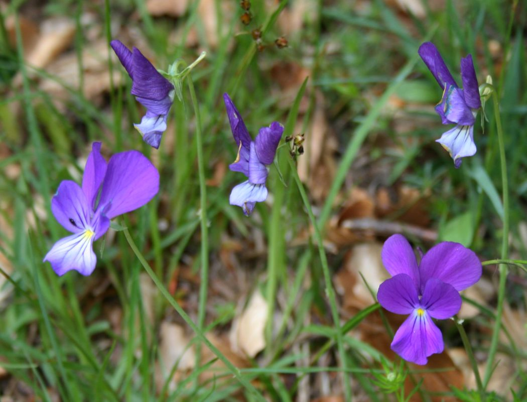 Viola aethnensis subsp. messanensis, Veilchengewächse (Violaceae) - Italien/Italia/Italy: Kalabrien/Calabria, Prov. Reggio Calabria, Parco Nazionale dell'Aspromonte, Vallata dell'Amendolea SE Diga del Menta